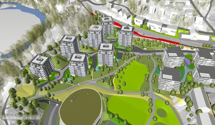 Slik blir nord-området med boligblokker i Mustad Eiendoms område på Lilleaker